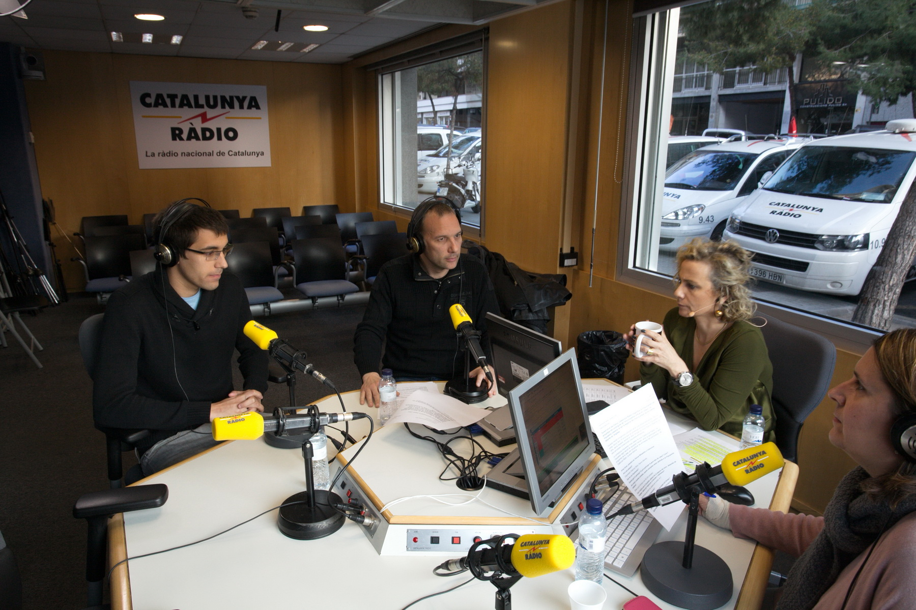 Imatges captades durant la Viquimarató Ramon Barnils a Catalunya Ràdio el 13-3-2015 per commemorar els 14 anys de la mort del periodista Ramon Barnils